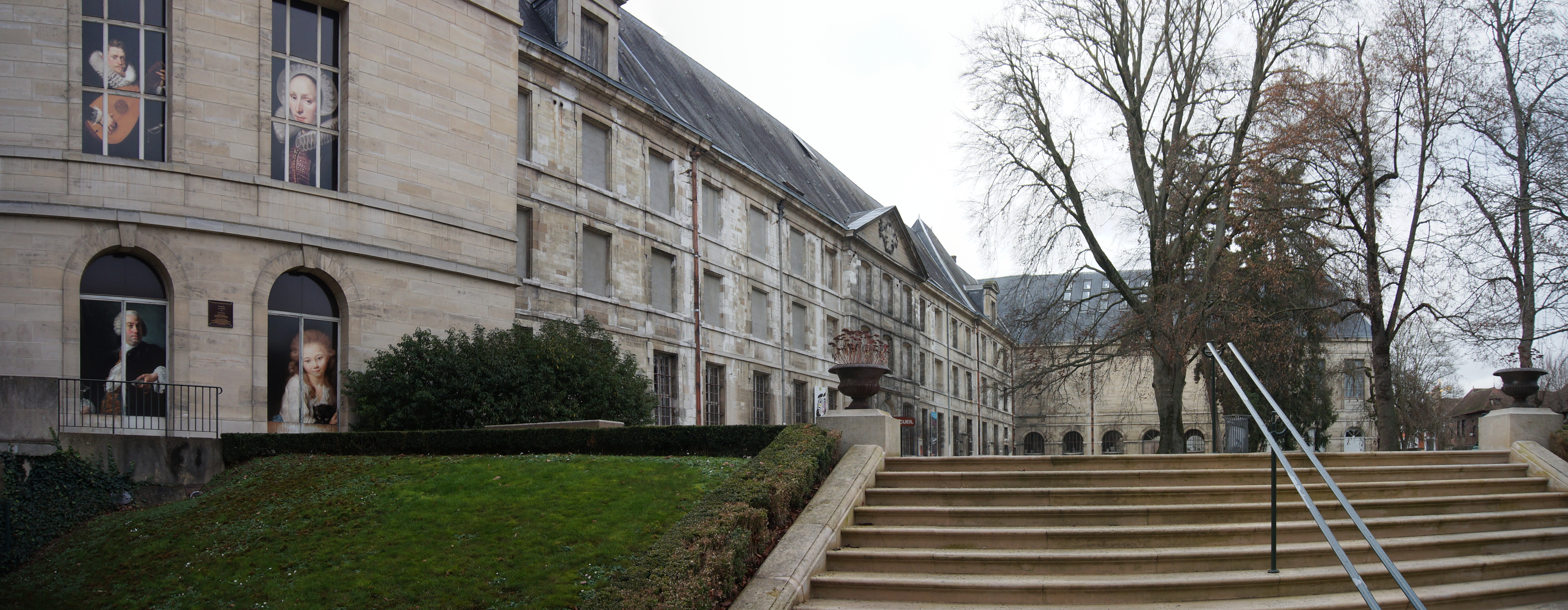 Musée Saint Loup à Troyes, dans l'Aube